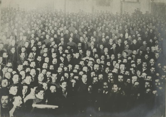 María Spiridónova rodeada de delegados campesinos en la conferencia previa al congreso de sóviets campesinos en noviembre-diciembre de 1917.